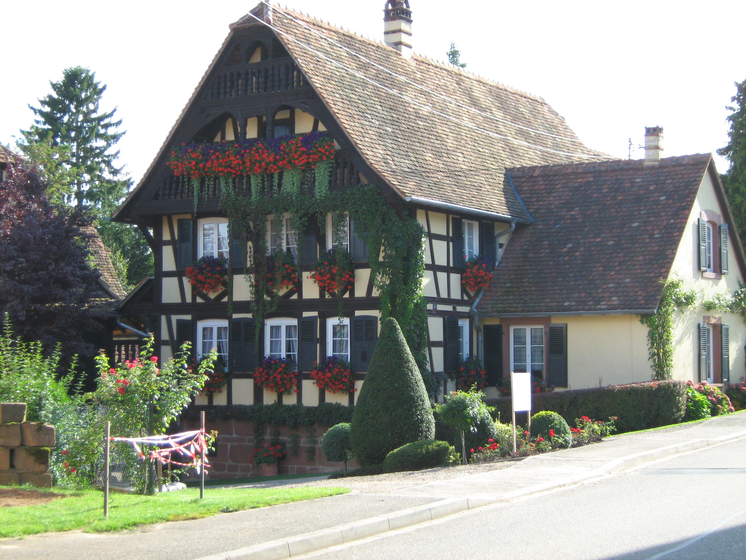 Maison à colombage située à Alteckendorf, Alsace, France